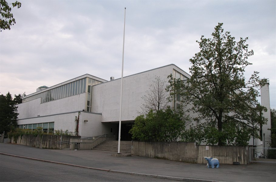 Lärkan, school in Etelä-Haaga district of Helsinki, Finland. (In Finnish: Lärkan, ruotsinkielinen koulu Etelä-Haagassa, Helsinki)